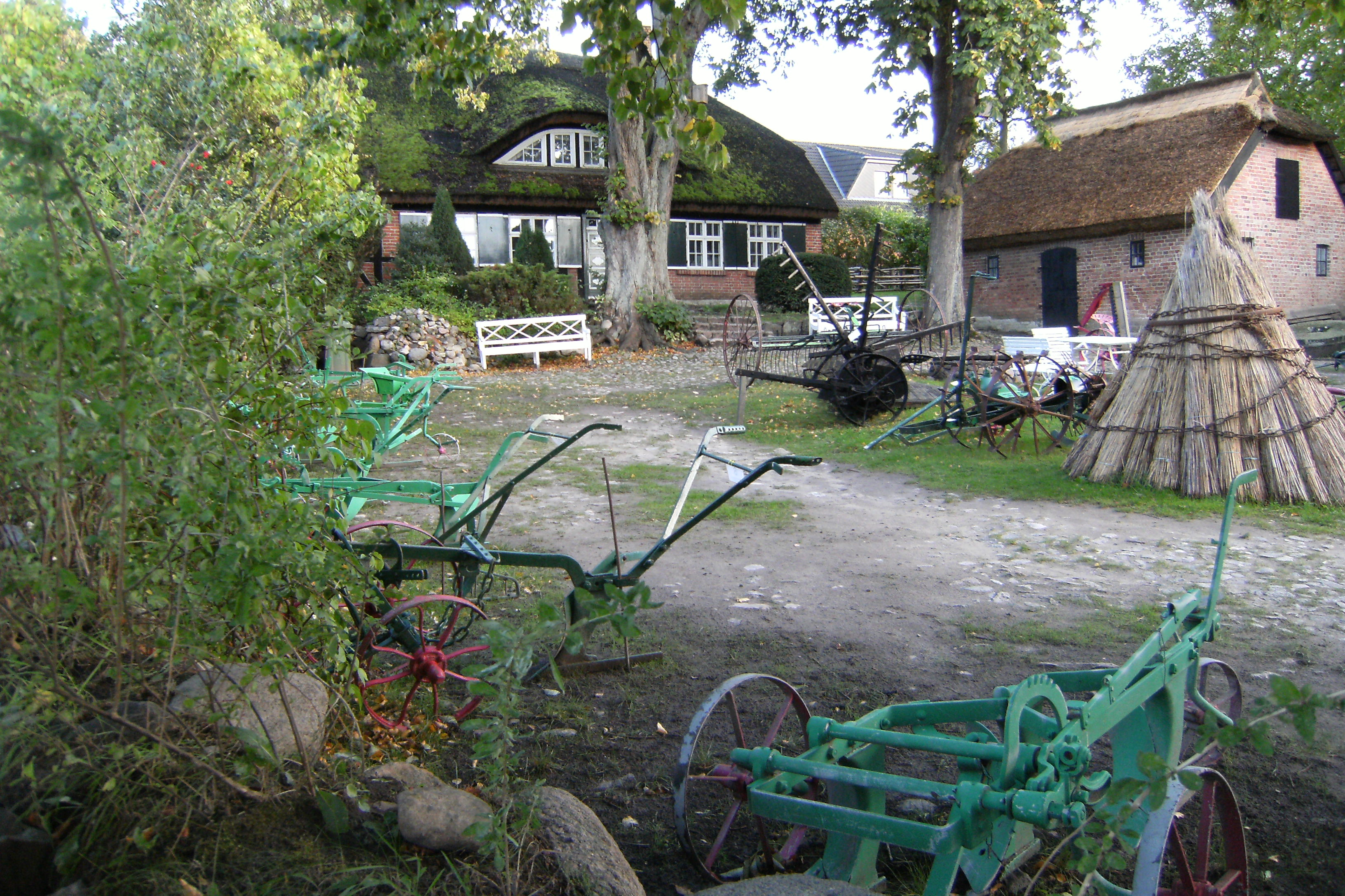 Museums-Bauernhof Göhren